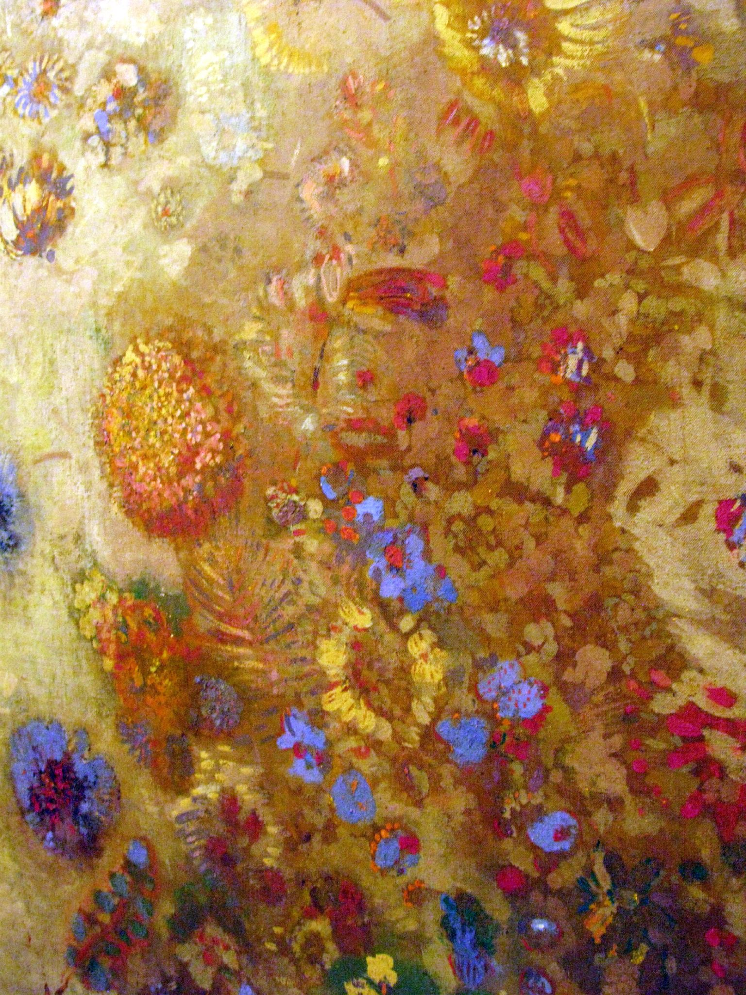 Odilon Redon, Panneau décoratif, 0729 Panneau Décoratif, Odilon Redon, 1902, detail